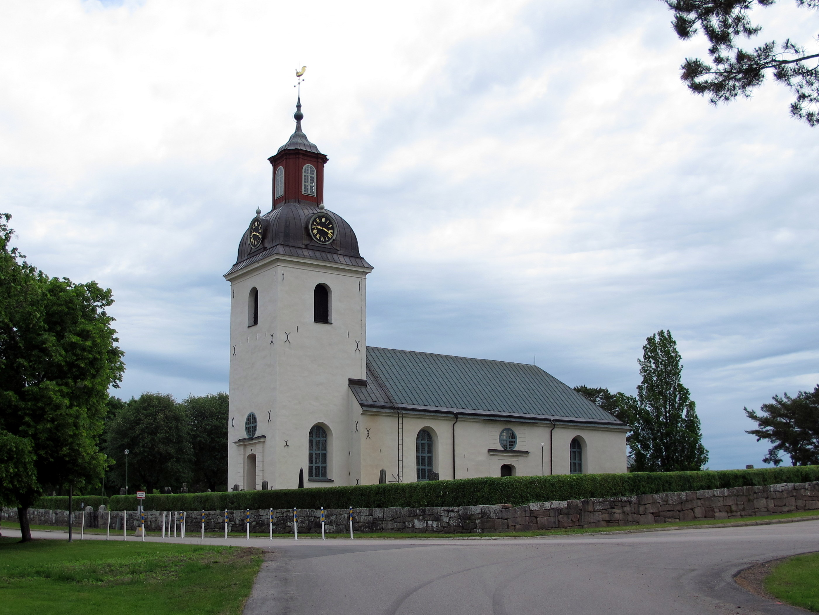 Årsunda kyrka.